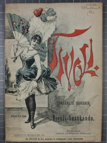 ”Oumbärlig handbok för Tivoli-besökande” – Stockholms Tivoli 1891